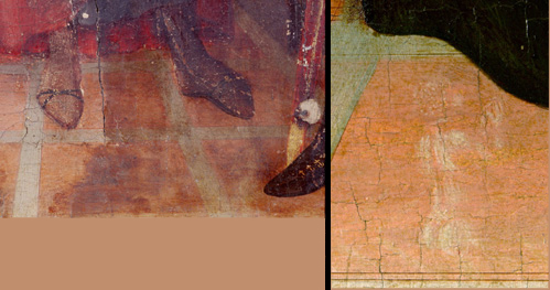 Gentile da fabriano, polittico dell'intercessione, dettaglio prima e dopo il restauro